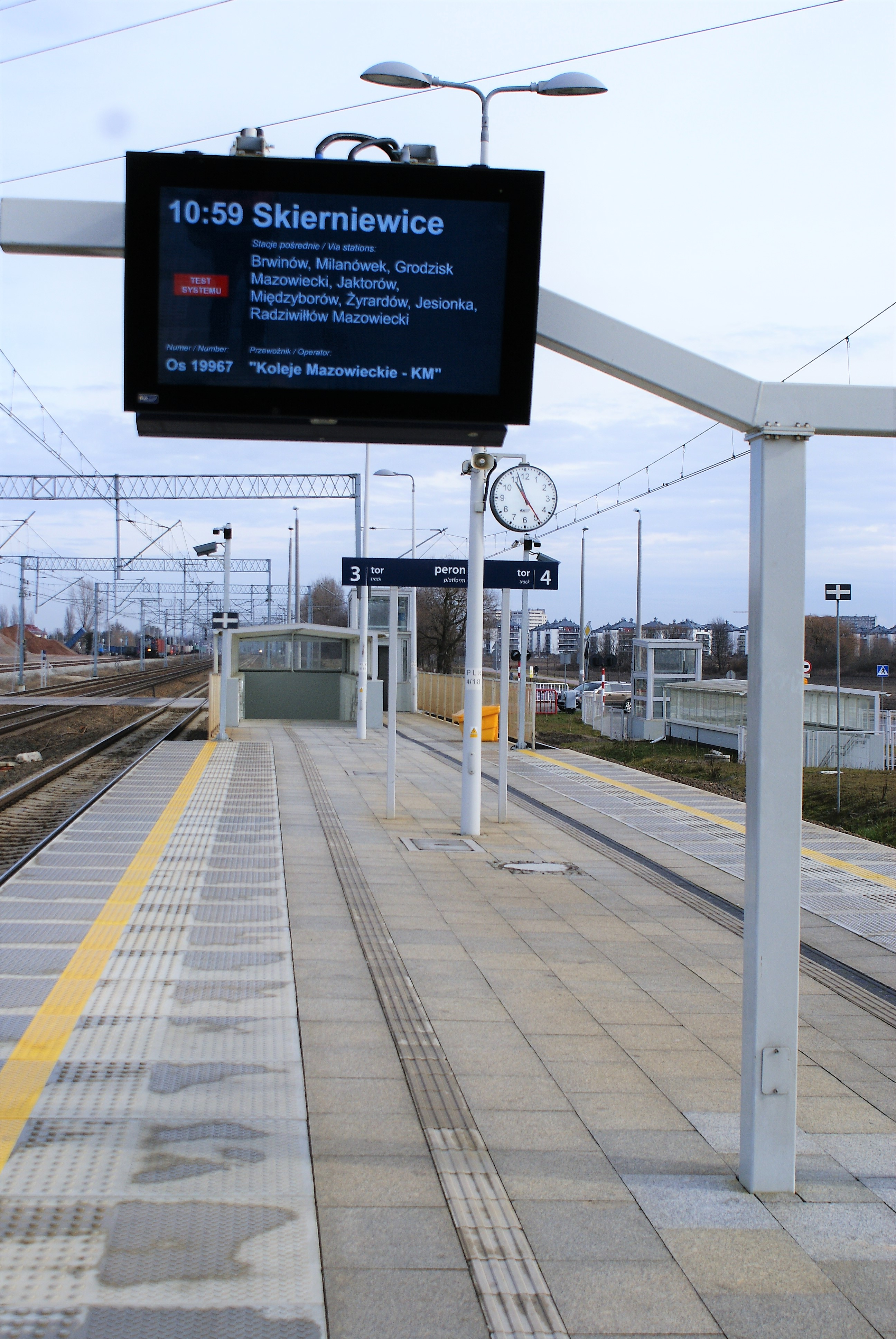 Tablica peronowa - stacja Parzniew